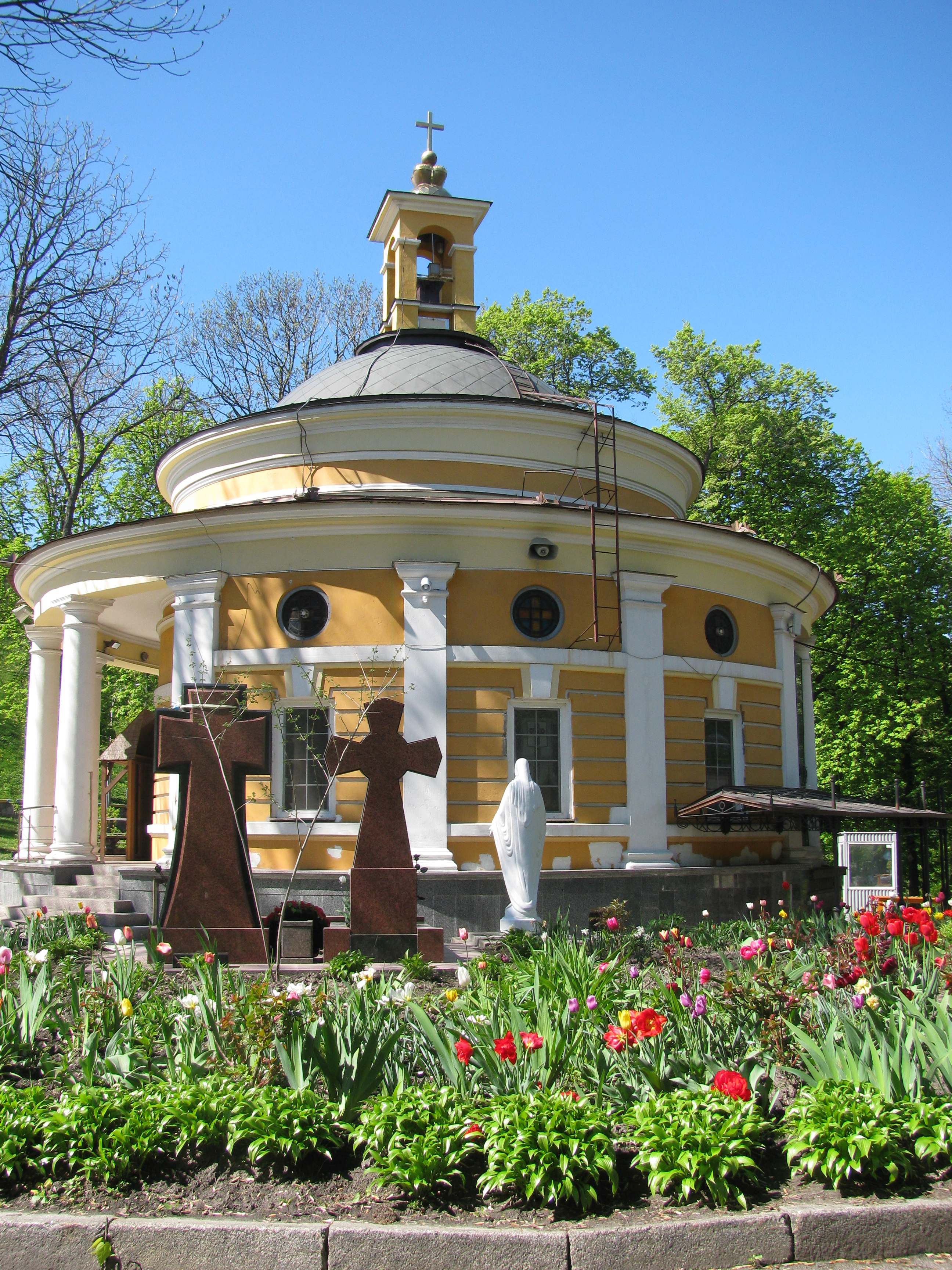 Аскольдова могила, Печерський район, Паркова дорога